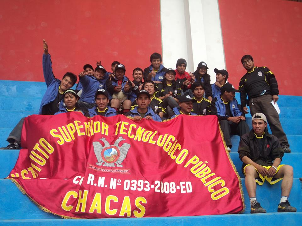 Jóvenes del Instituto Superior Tecnológico Público de Chacas